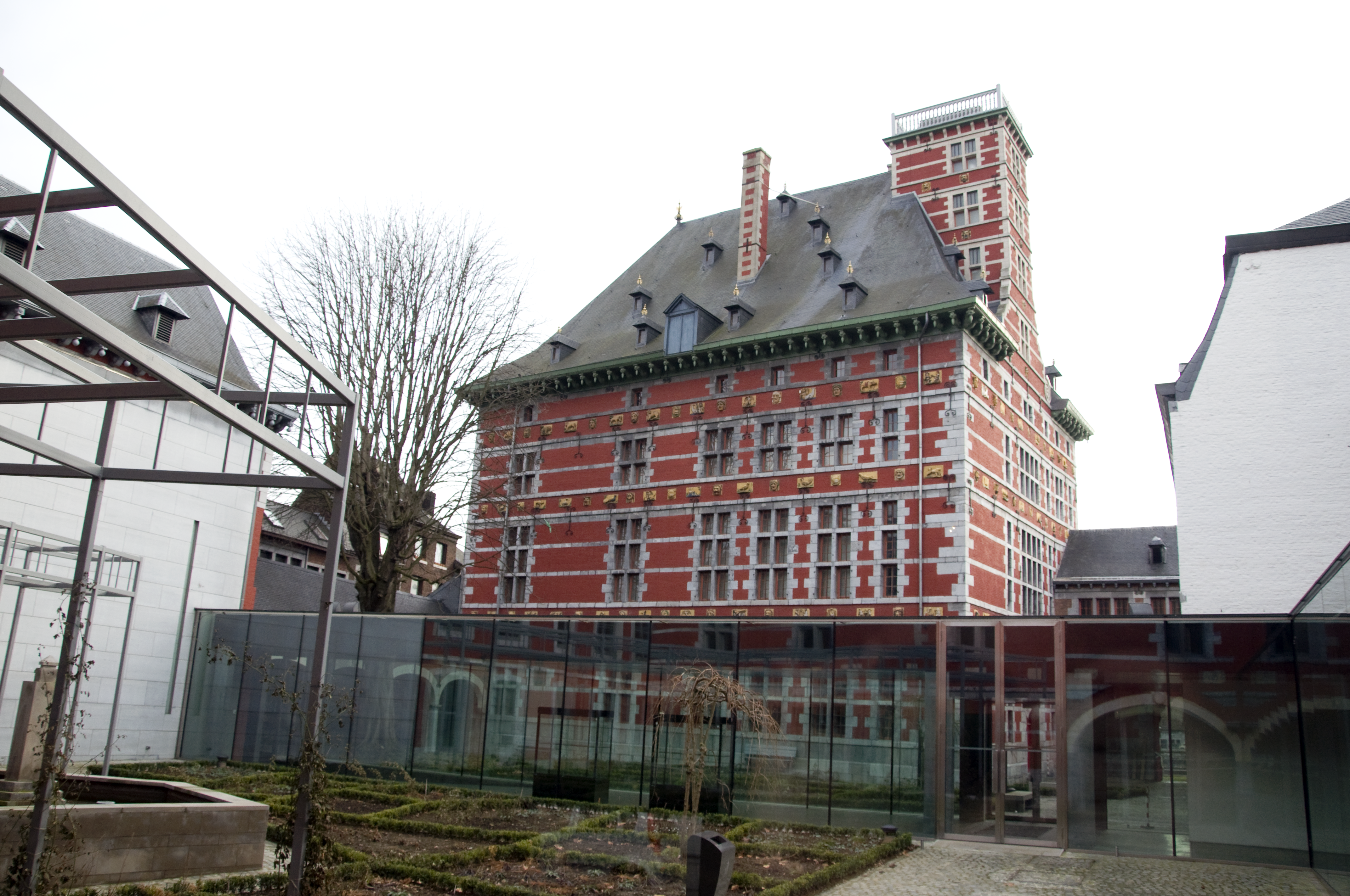 "Grand Curtius", museum in de Belgische stad Luik